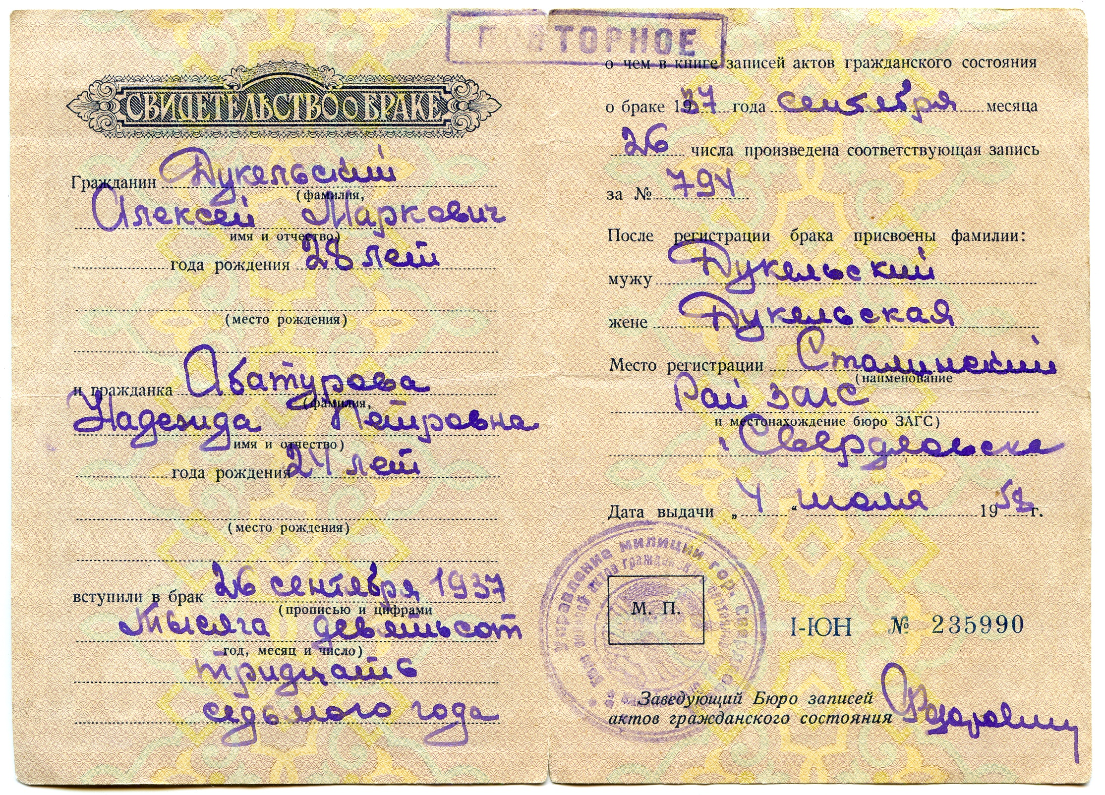 Свидетельство о 2-м браке архитектора Дукельского Алексея Марковича. Свердловск, 26 сентября 1937г.